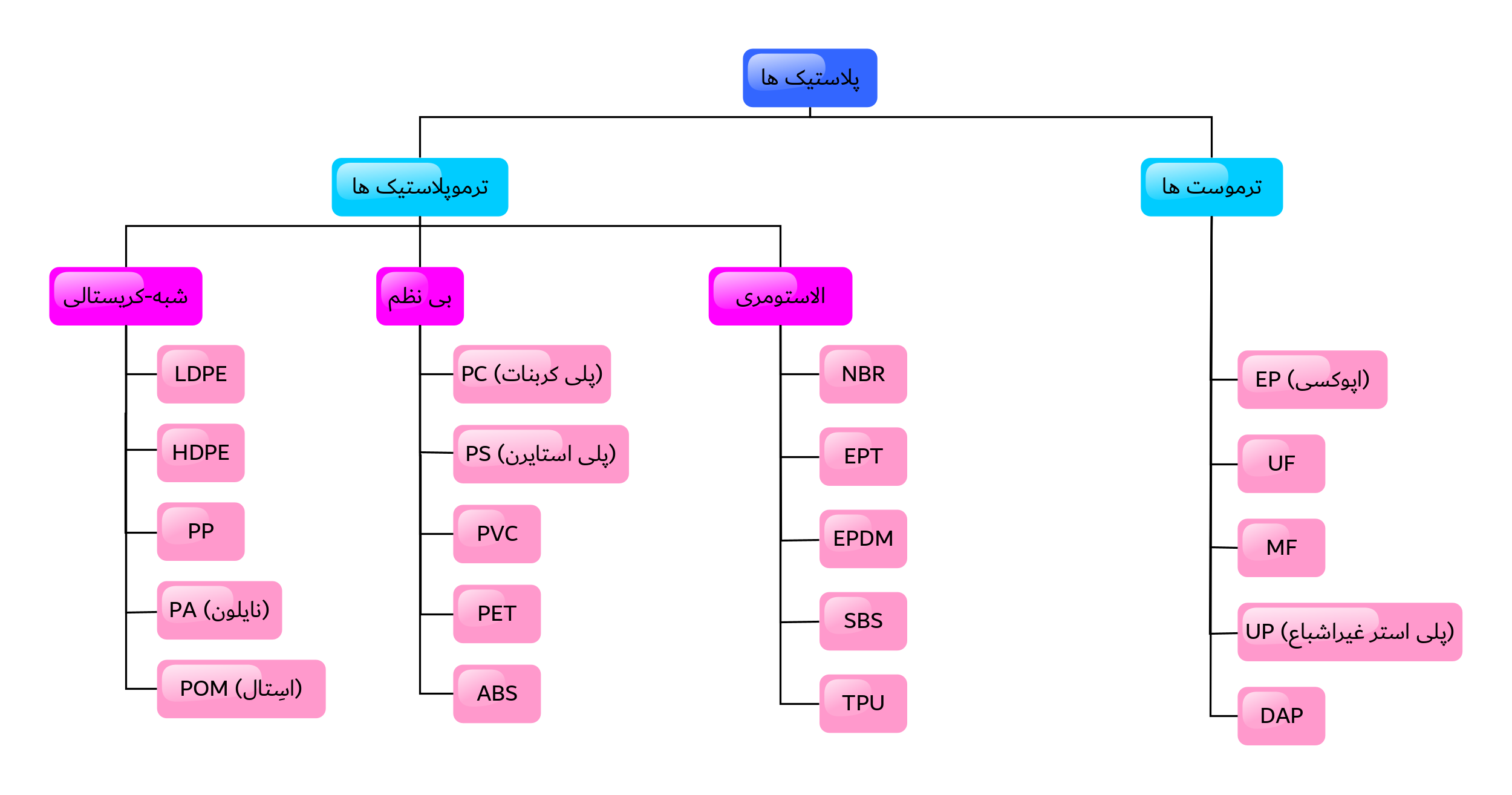 طبقه بندی انواع پلاستیک ها